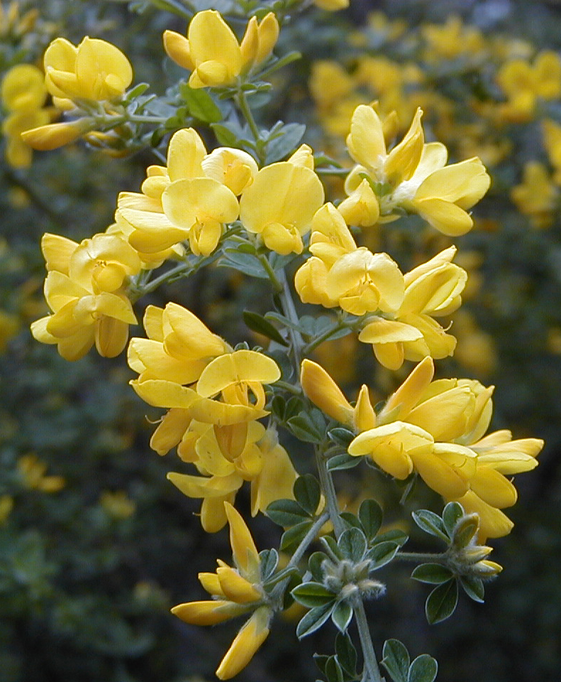 Genista canariensis (syn. Teline canariensis). Real Jardín Botánico, Madrid.